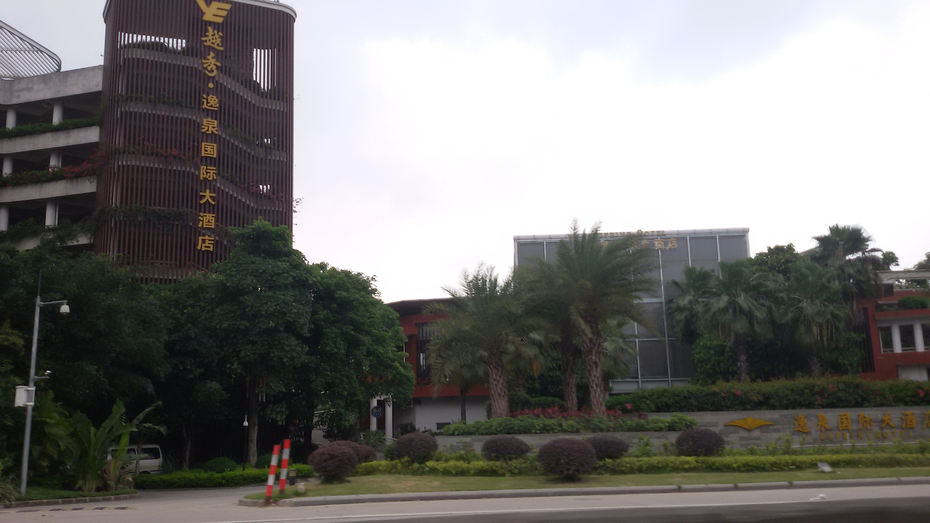 粵語: 逸泉國際大酒店